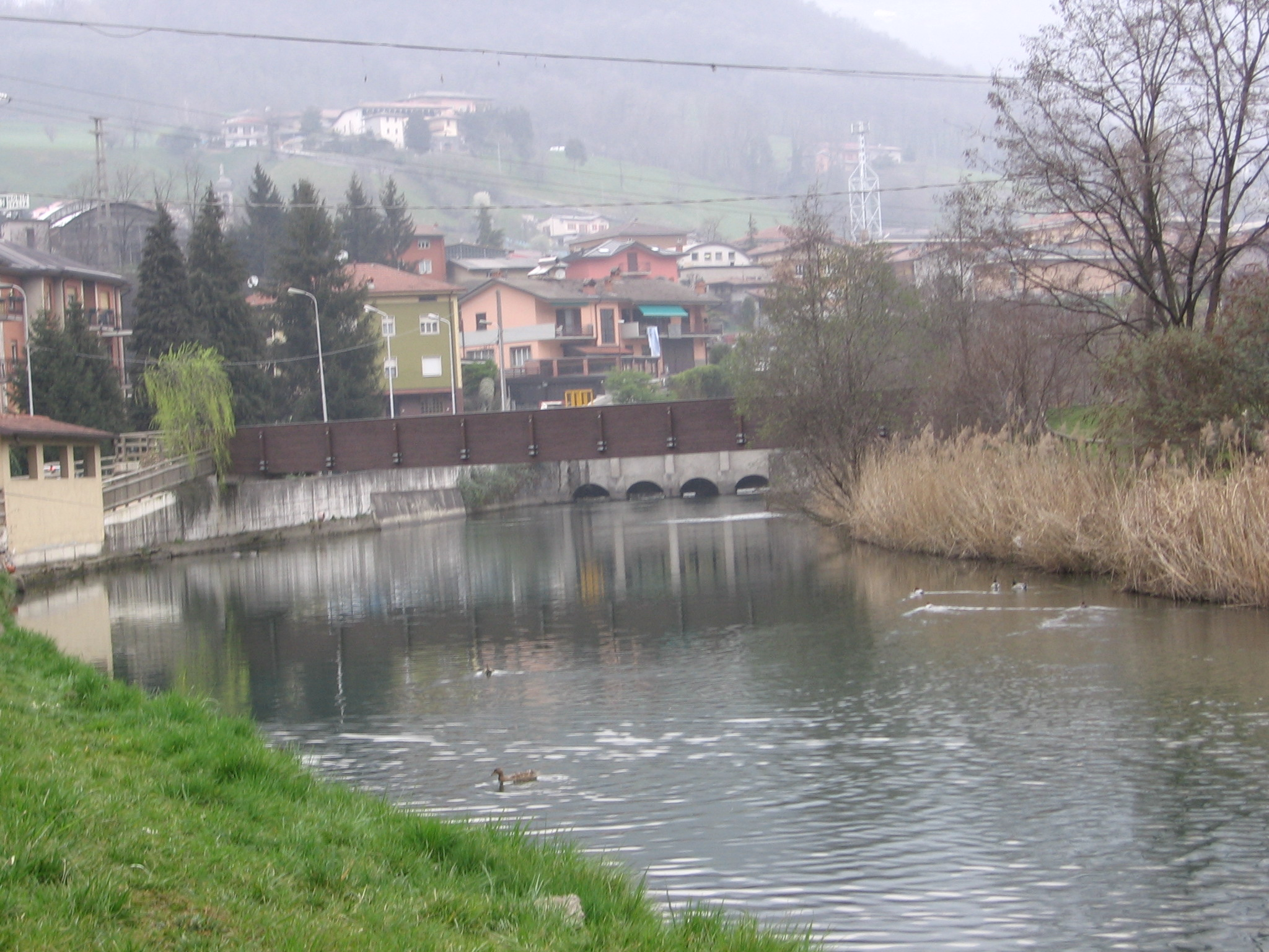 Fiorano al Serio, Bergamo, Italia